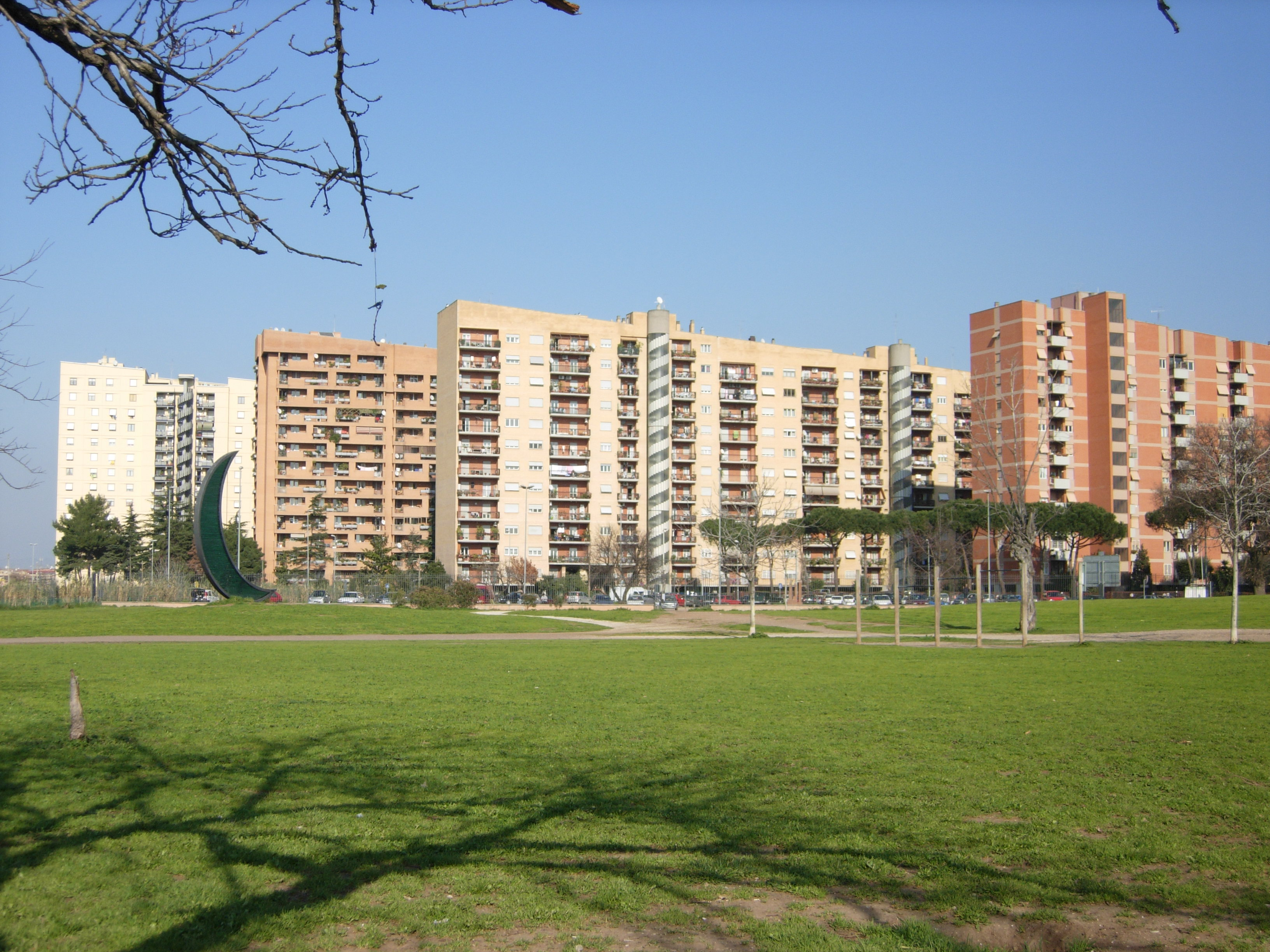 Roma - Villa de Santis - Casilino 23